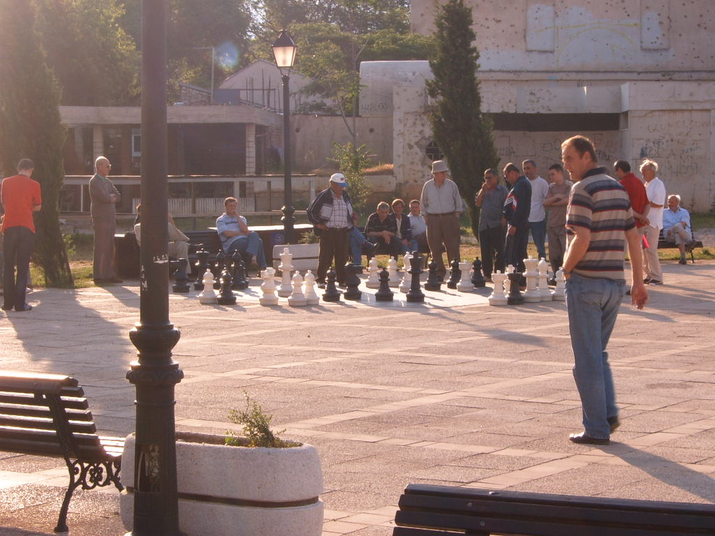 Шаховска табла у Мостару